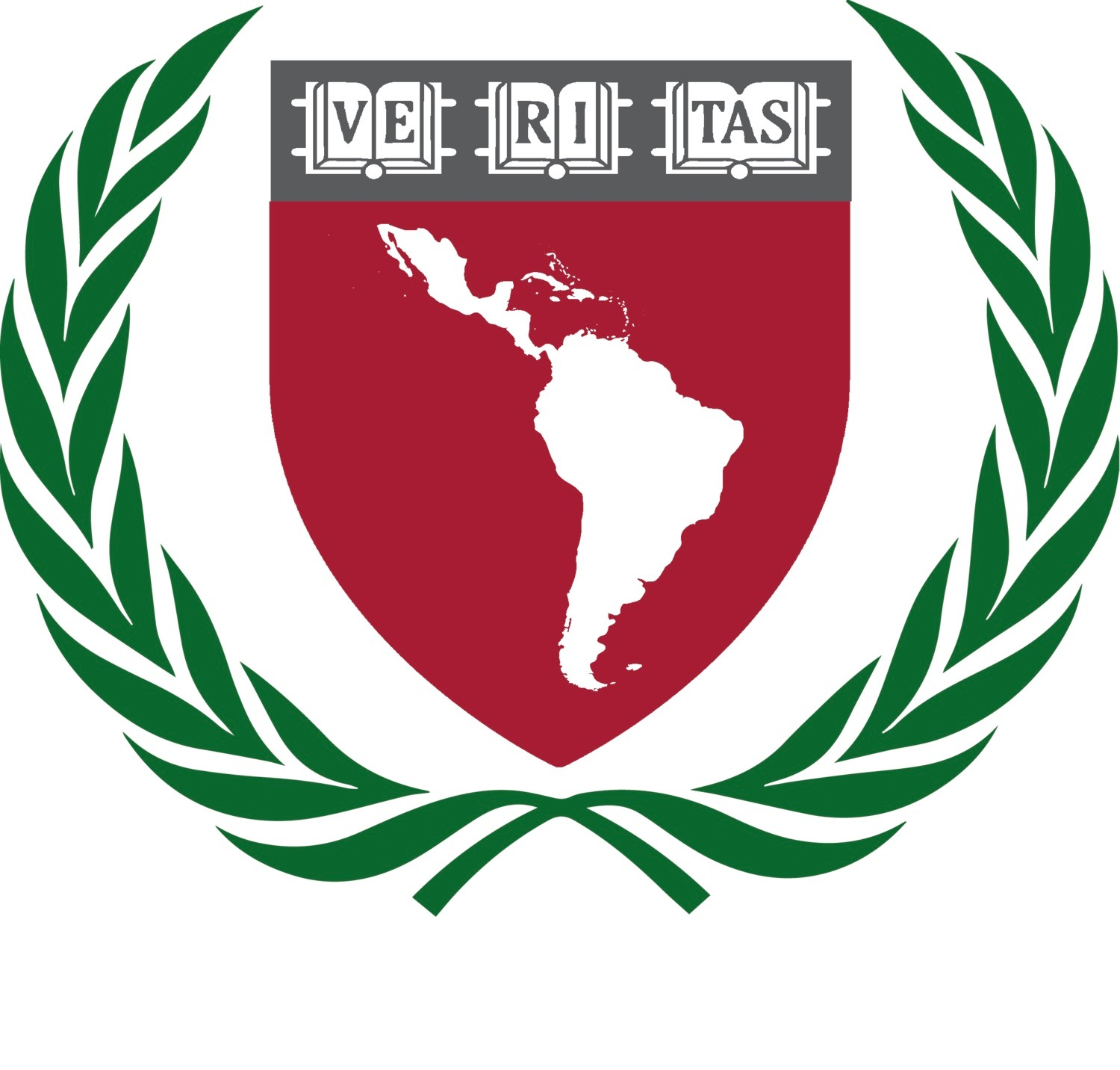 Este es el logo oficial de la conferencia modelo onu 2020 en Mexico, Puebla